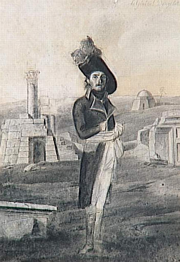 François-Xavier Donzelot (1764-1843), général de la Révolution et de l'Empire